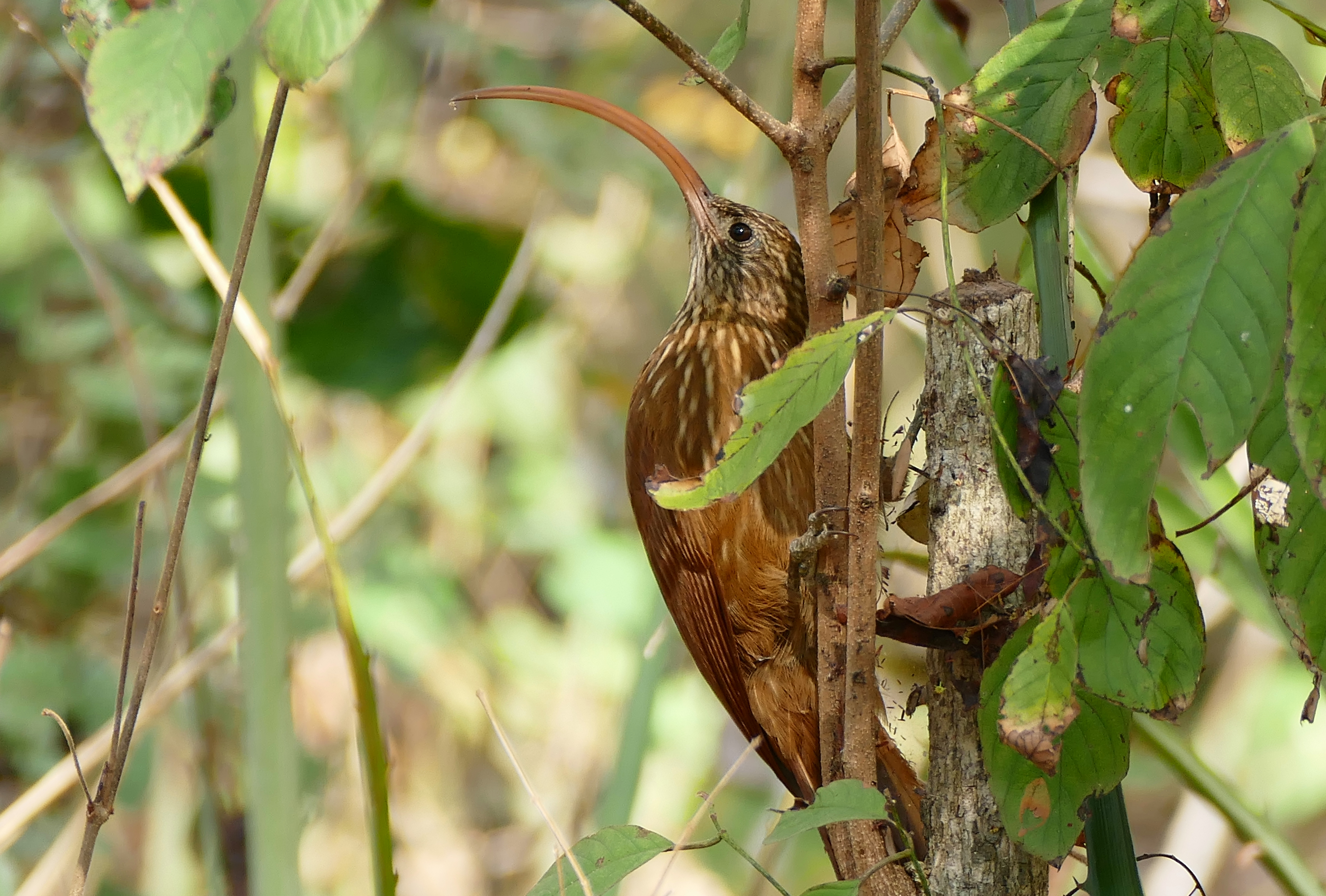 Pousada Rio Claro, Transpantaneira, Poconé, Mato Grosso, BRAZIL